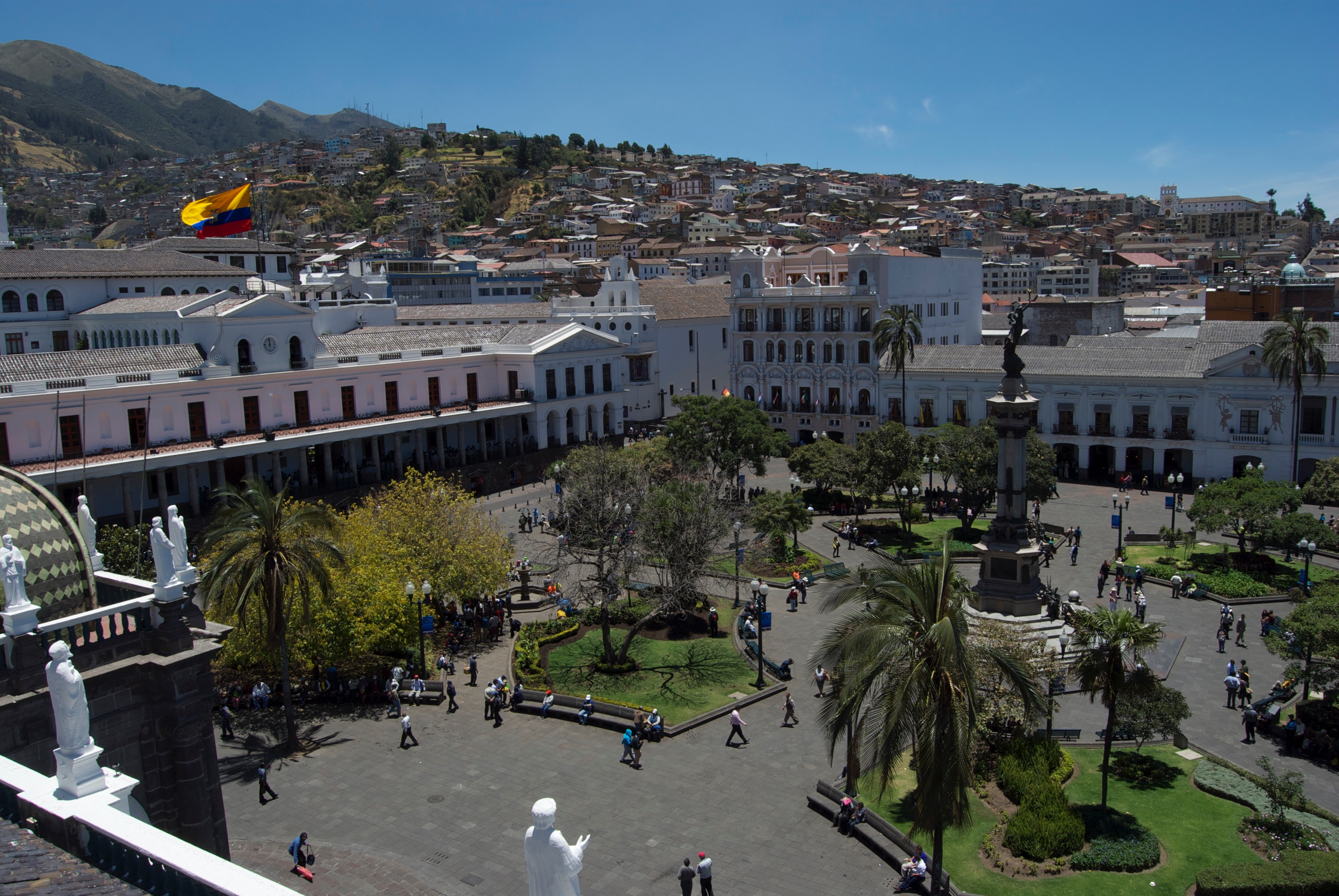 Plaza de la independencia. Al rededor de ella encontramos varios edificios gubernamentales y eclesiásticos